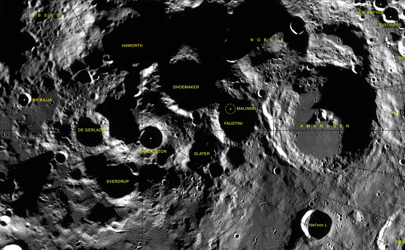 Cráter lunar Faustini. Localización. (Imagen LROC)